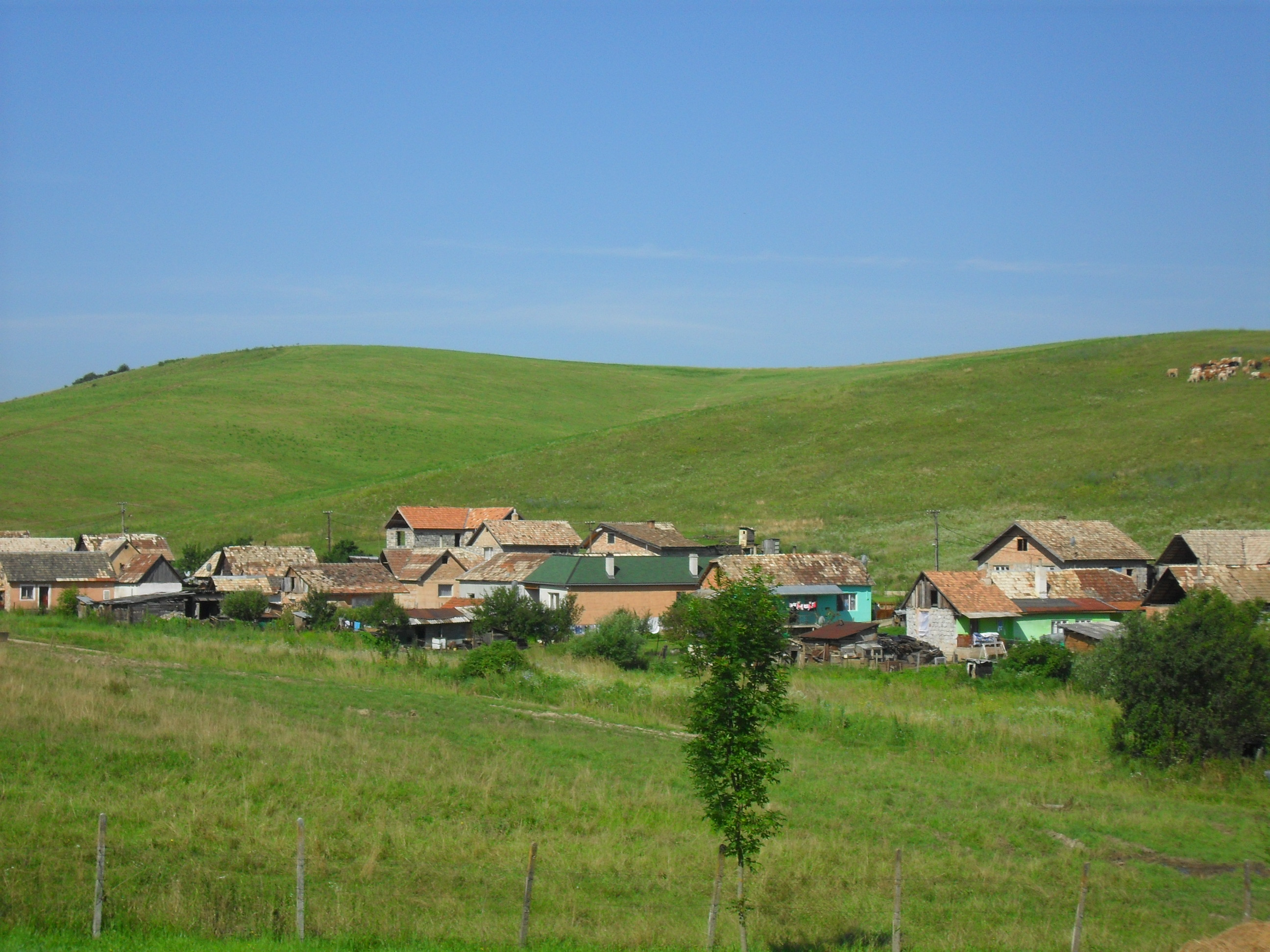 Kálosa - kilátás a cigánysorra a temetődombról